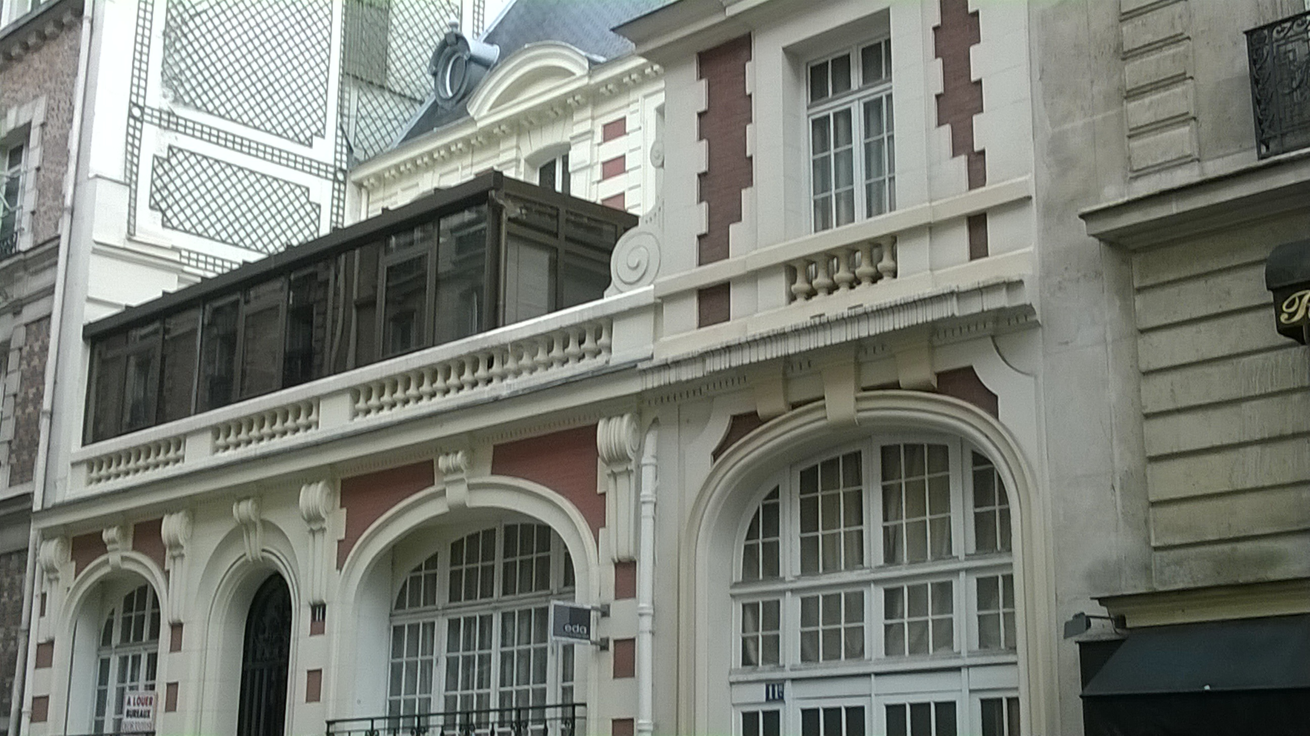 no 11 de la rue Poisson Paris 17è hôtel particulier de 1906